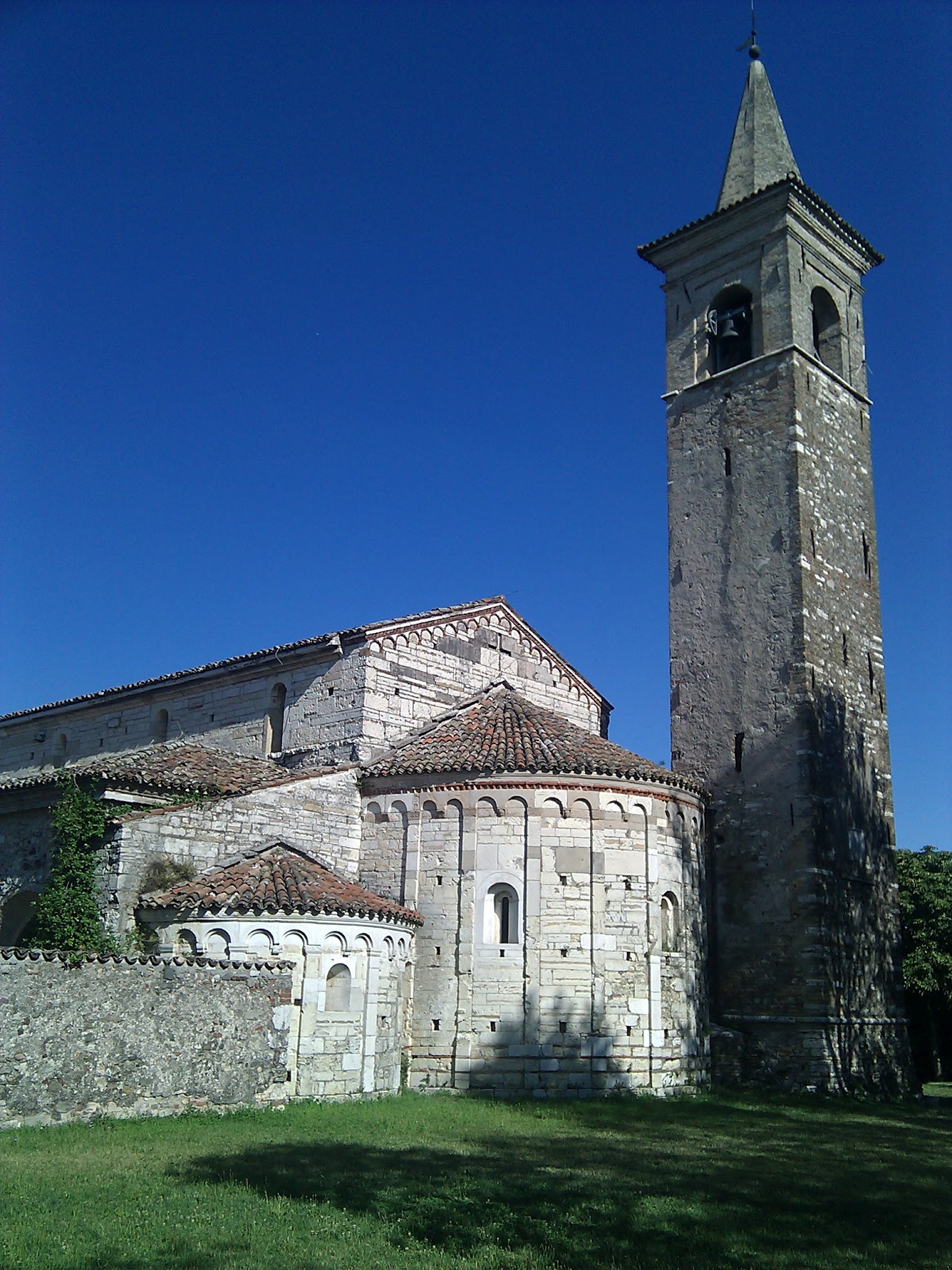 Chiesa di San Pancrazio - Abside e torre campanaria - Montichiari